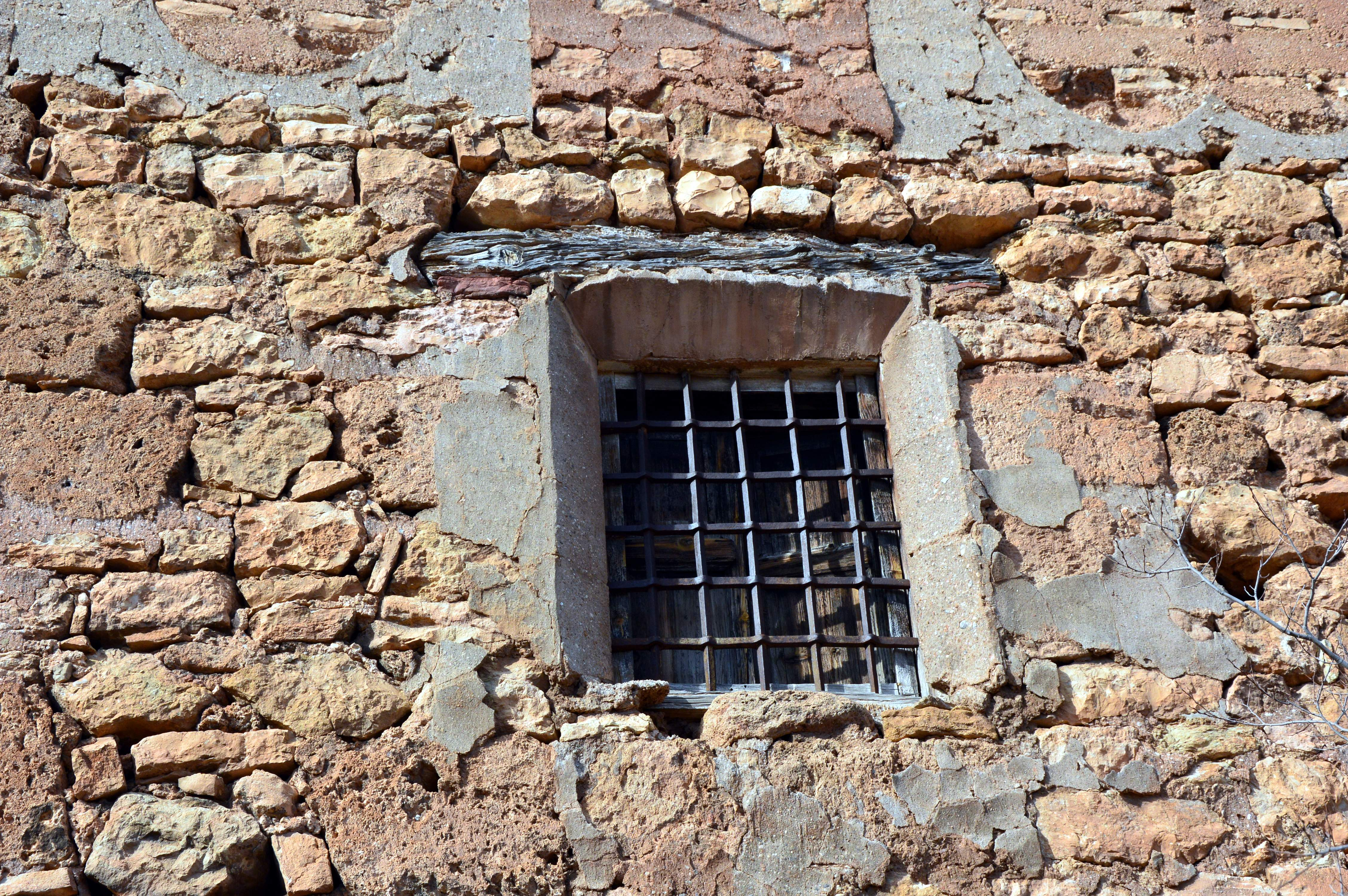 Detalle de ventana con reja de forja en la fachada meridional de la Casa Abadía de Castielfabib (Valencia), perteneciente al recinto amurallado (2019).